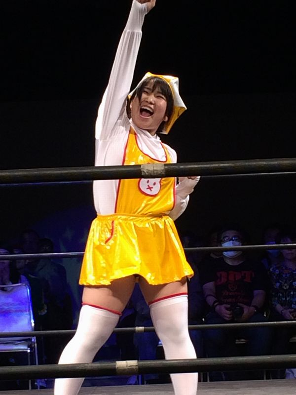 2016年3月6日大阪大会